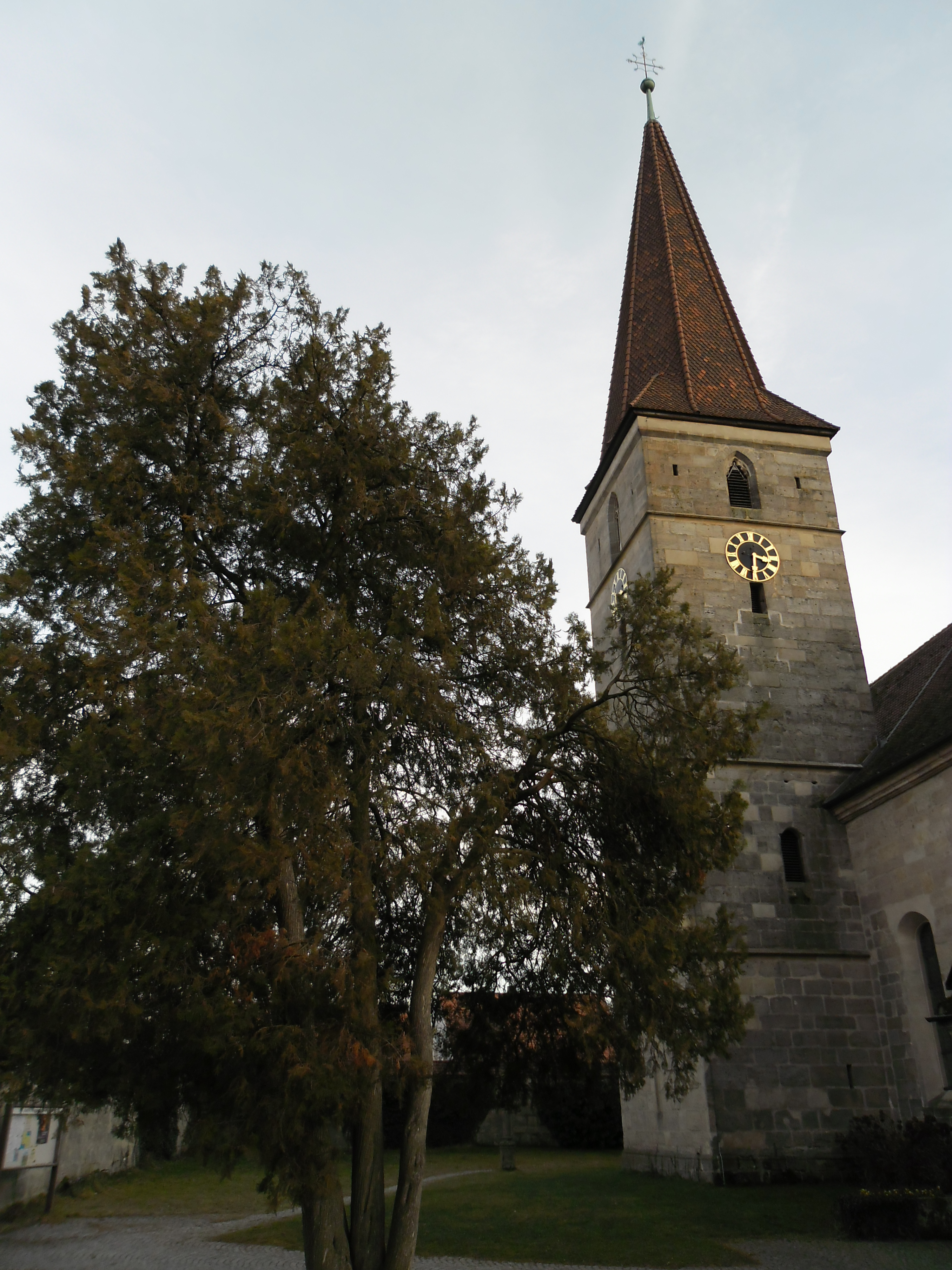 St. Xystos/St. Sixtus zwischen Altem Markt und Bachgraben stammt aus der Zeit um 1400, das Langhaus wurde um 1550 erbaut. Die katholische Pfarrei wurde 996 gegründet und gehörte anfangs zum Erzbistum Mainz.